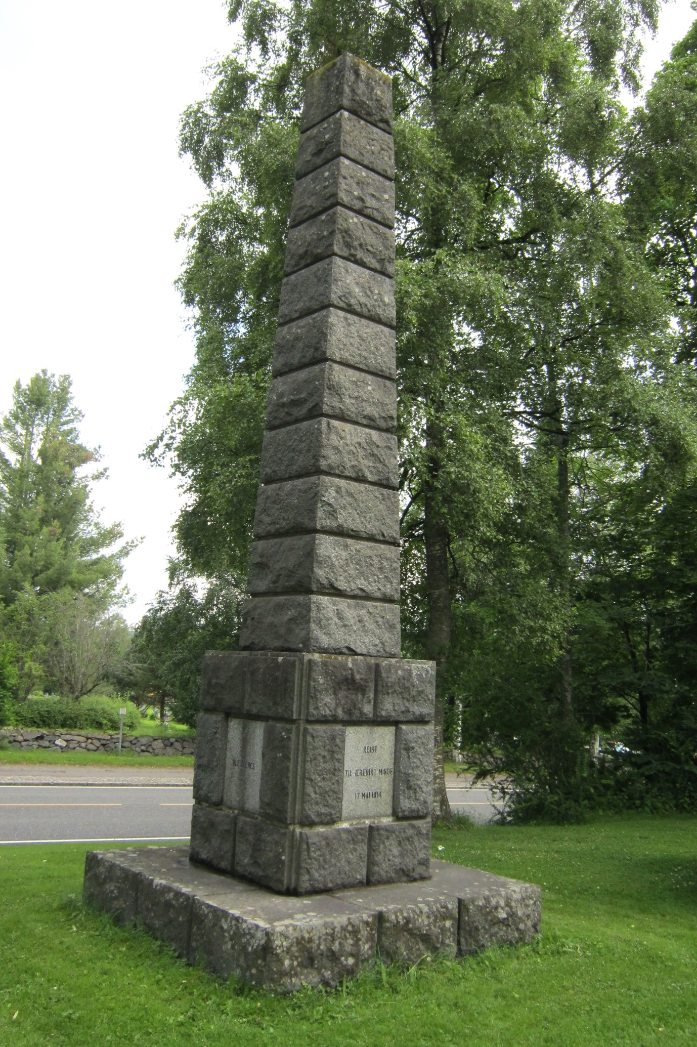 Minenbauta over Ole Apenes (og Herman Wedel-Jarlsberg) utenfor Sem kirke